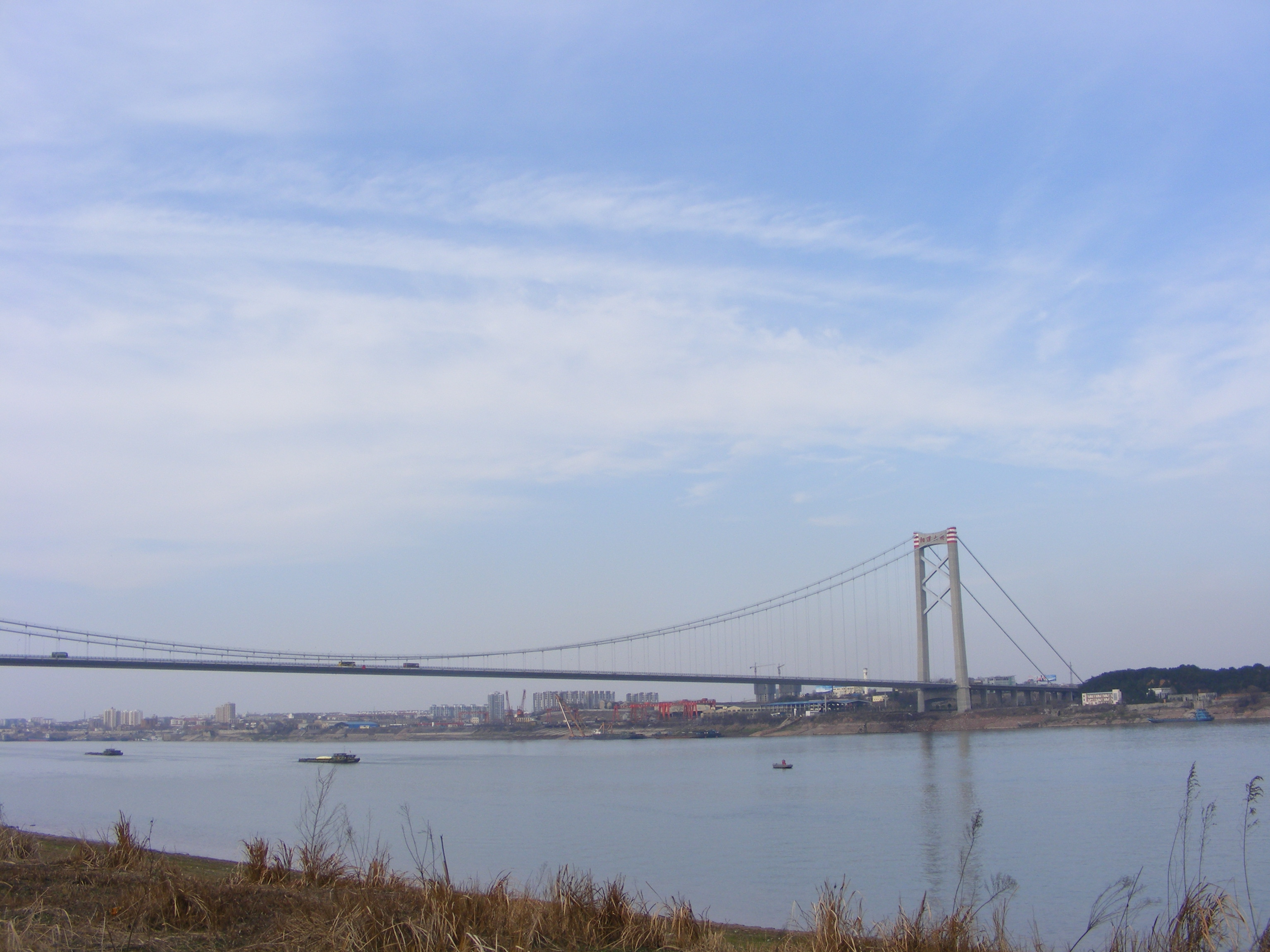 武汉市阳逻长江大桥